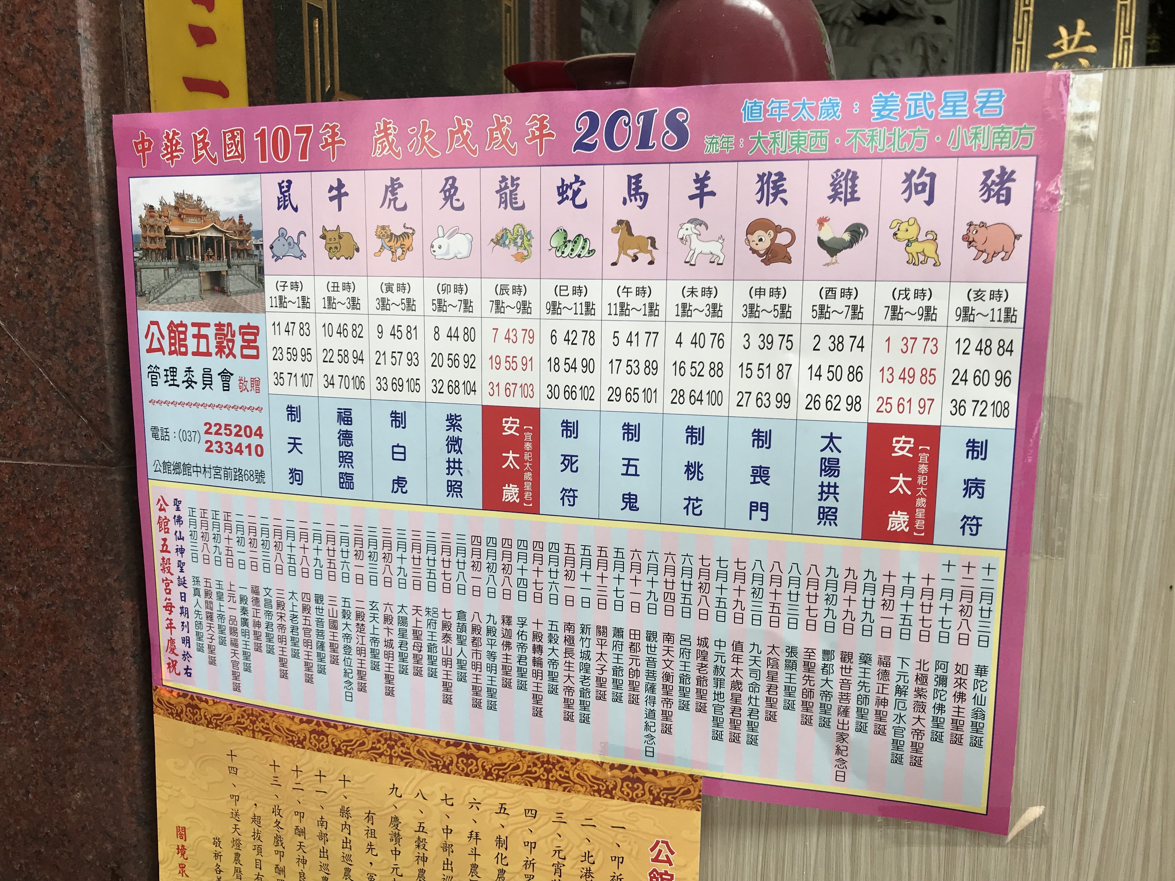 公館五穀宮2018年太歲犯沖表